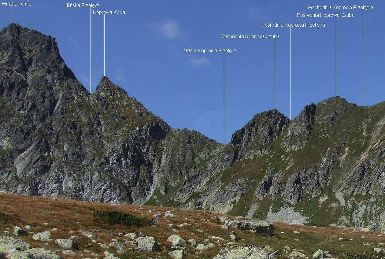 Hlińska Turnia i Hlińska Przełęcz, widk z Doliny Mięguszowieckiej(Tatry Wysokie